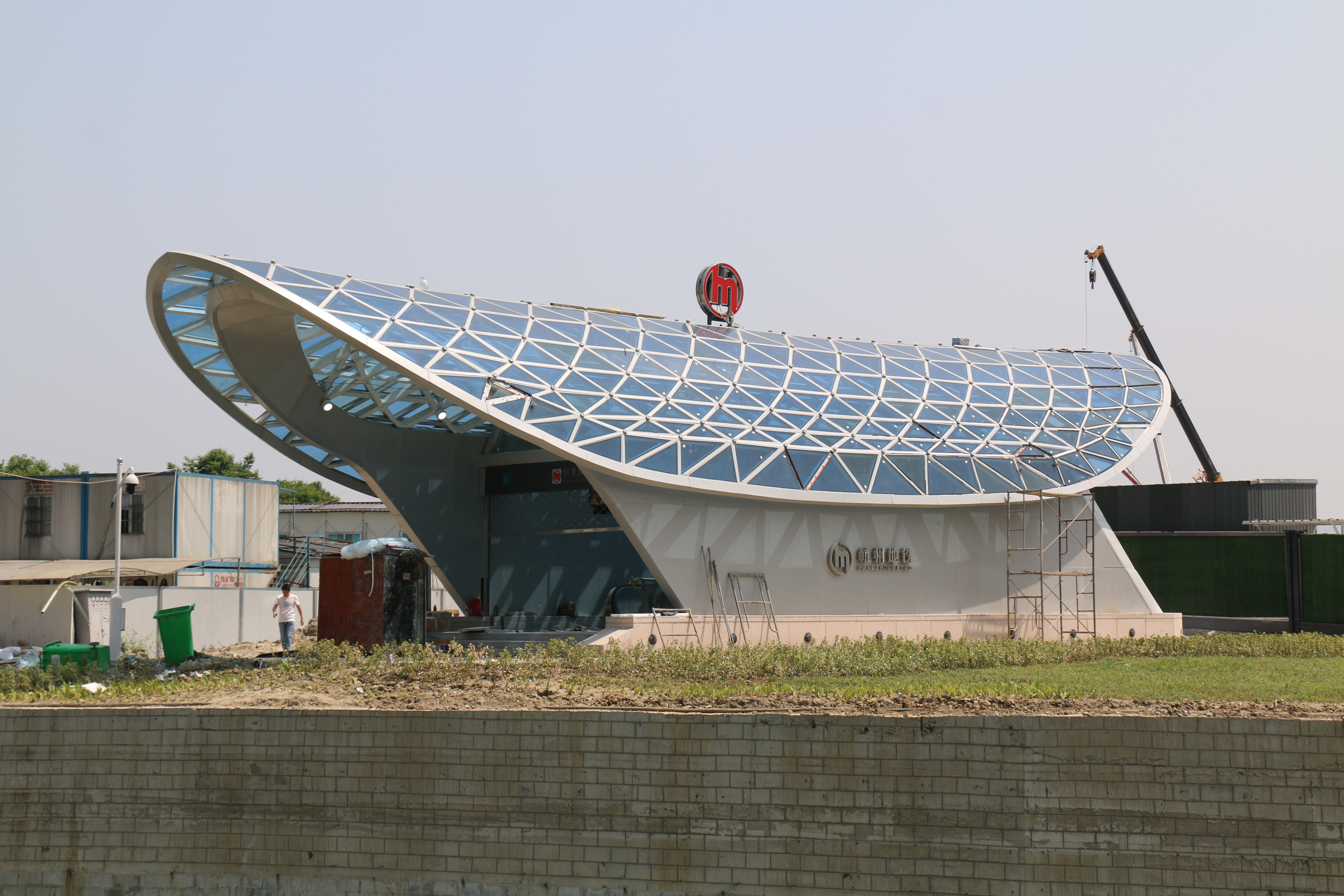 创景路站G入口